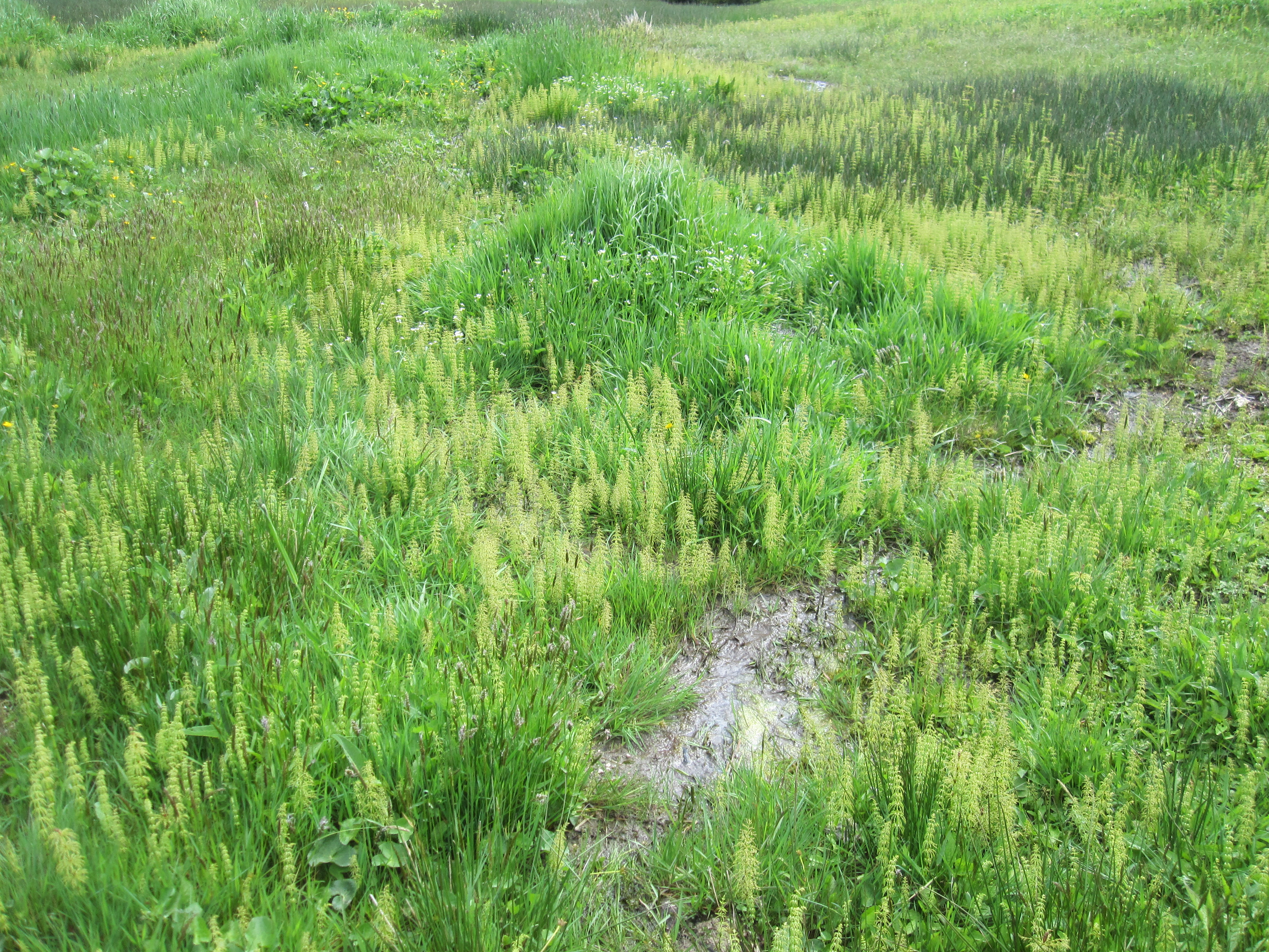 Das Naturschutzgebiet Moore südlich von Schönheide entstand 2013 durch eine Verordnung des Erzgebirgskreises. Der in Karten bis ins ausgehende 20. Jahrhundert in Landkarten unbenannte, in der Topographischen Karte 1:10.000 Nr. 5541-NW-Wilzschhaus als "Hochmoorbächel" und im Gutachten der RANA "Purichbächel" (RANA - Büro für Ökologie und Naturschutz Frank Meyer: Naturschutzfachliche Würdigung für das geplante Naturschutzgebiet „Moore südlich von Schönheide“, Halle 2012 Digitalisat) genannte Bach entspringt im oberen Bereich des Naturschutzgebietes, fließt durch das Naturschutzgebiet hindurch und mündet oberhalb des Schönheider Wohnplatzes Altes Wiesenhaus in etwa 580 Metern Höhe in die Zwickauer Mulde. Quellbereich.